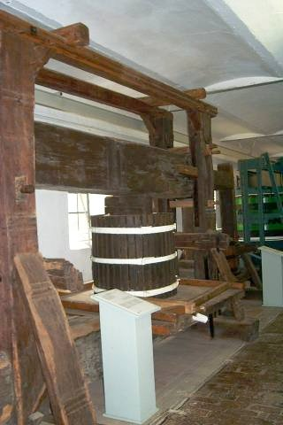 Wine - open air museum Roscheider Hof, Konz